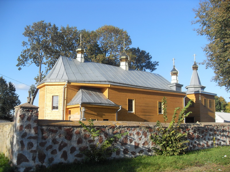 Трабы. Царква Святых Пятра і Паўла